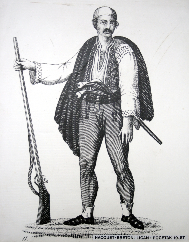 snimljeno tijekom Noći muzeja u Etnografskom muzeju u Zagrebu